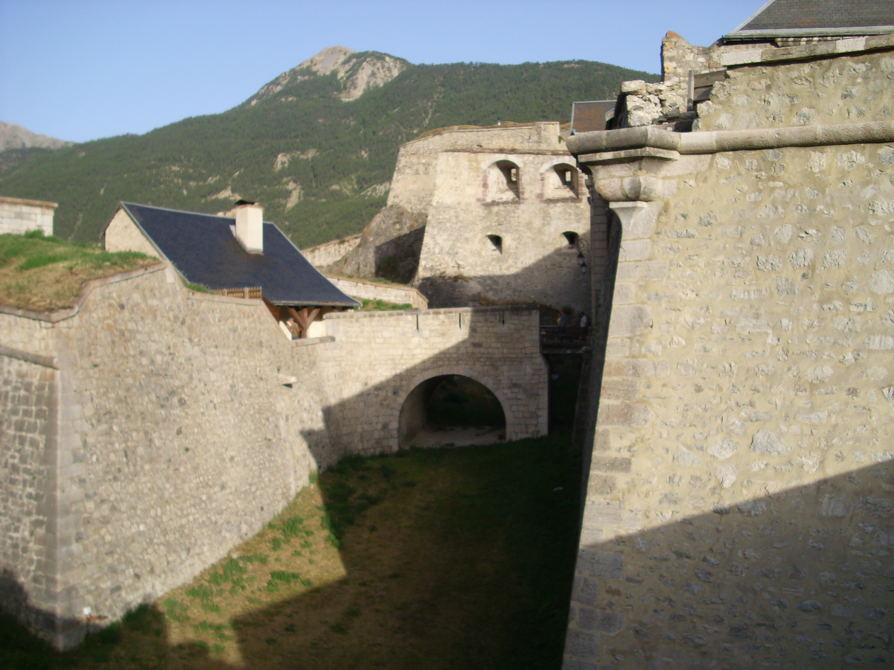 La cittadina di Briançon, Francia